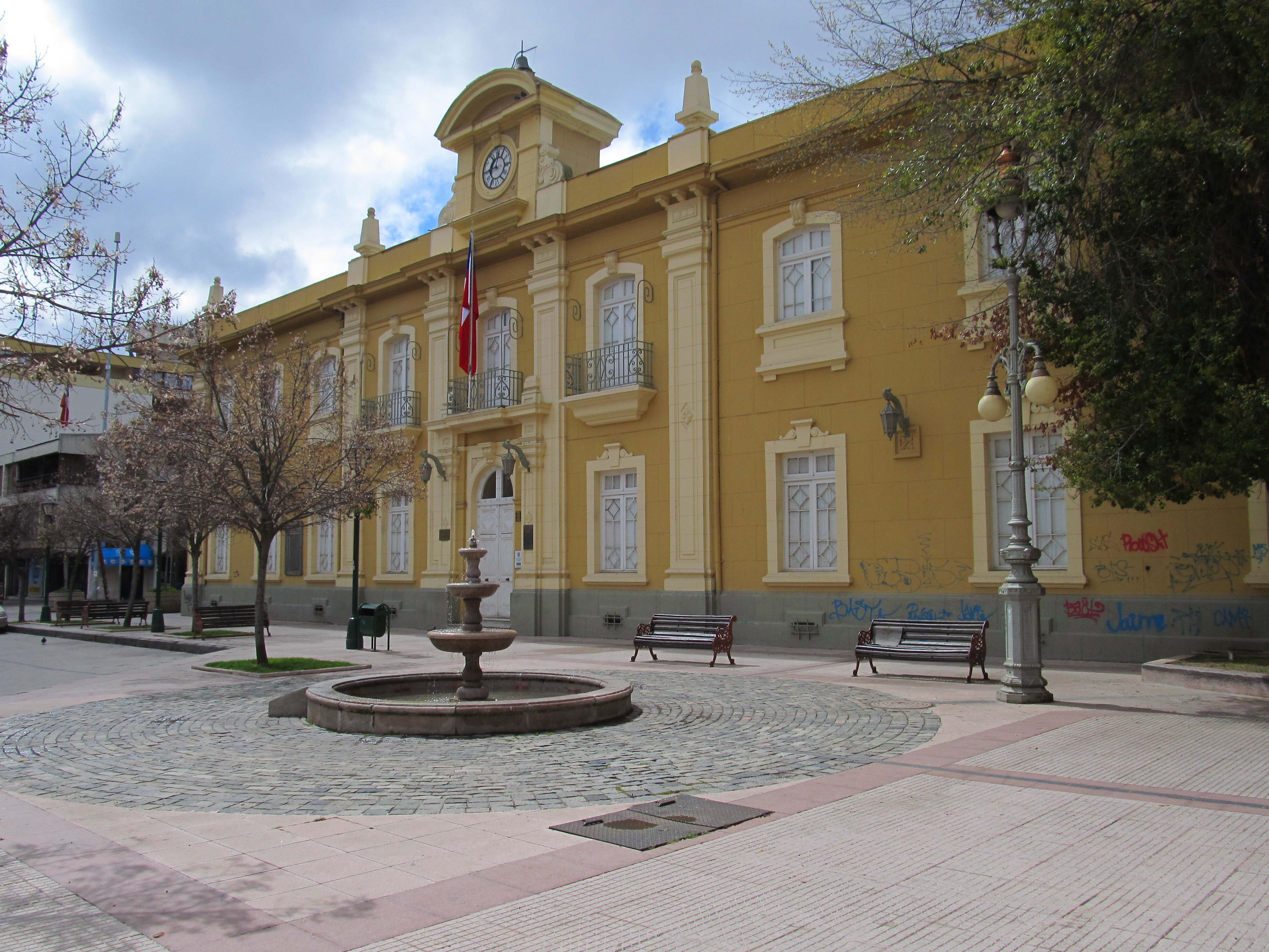 Gobernación de Provincia de Cachapoal This is a photo of a national monument in Chile: 641